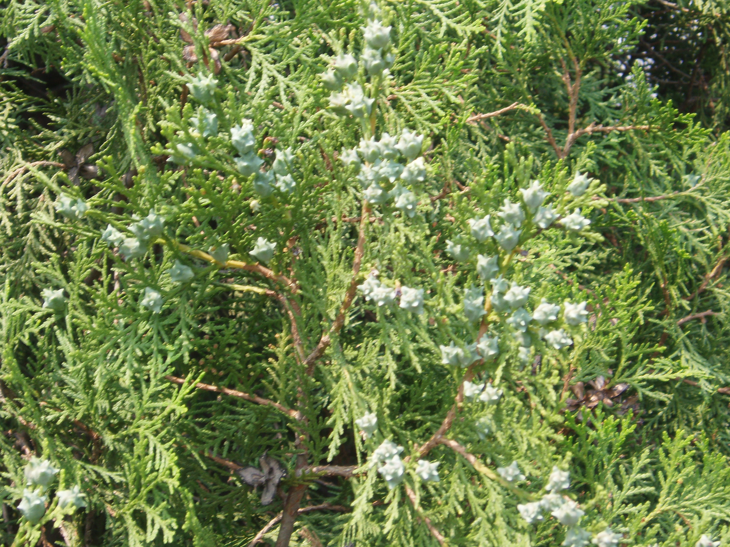 Oriental arborvitae, Chinese arborvitae